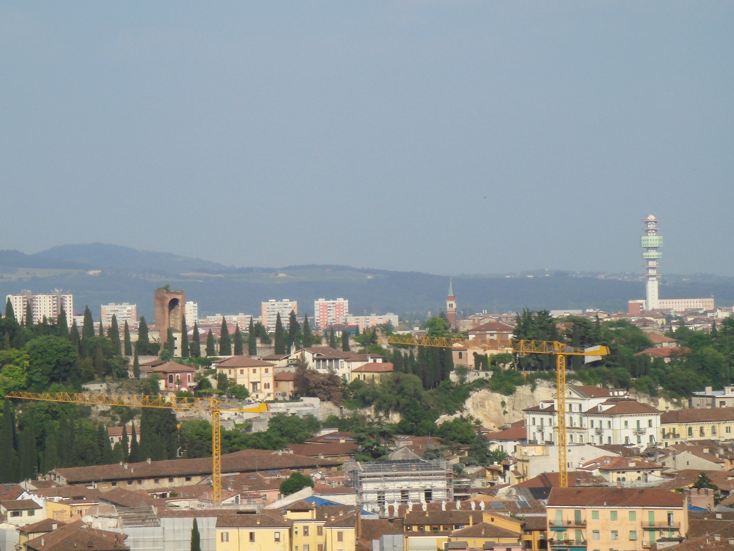 Borgo Venezia, Verona est